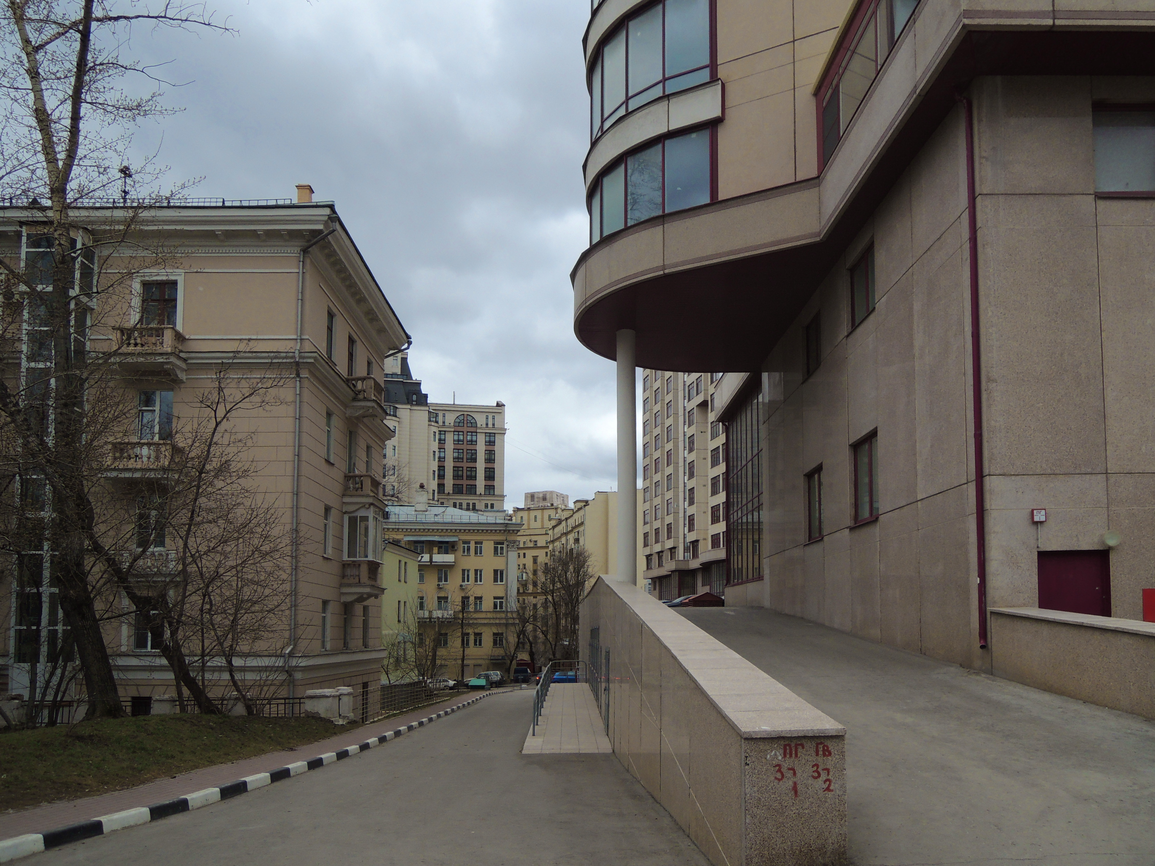 Вид из Прямого переулка во внутриквартальный проезд к Панфиловскому переулку, вдоль задней стены дома по Новому Арбату 27. Собственно, и Панфиловский тоже здесь становится внутриквартальным.